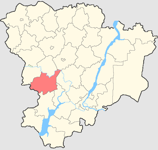 Клетский район на карте Волгоградской области